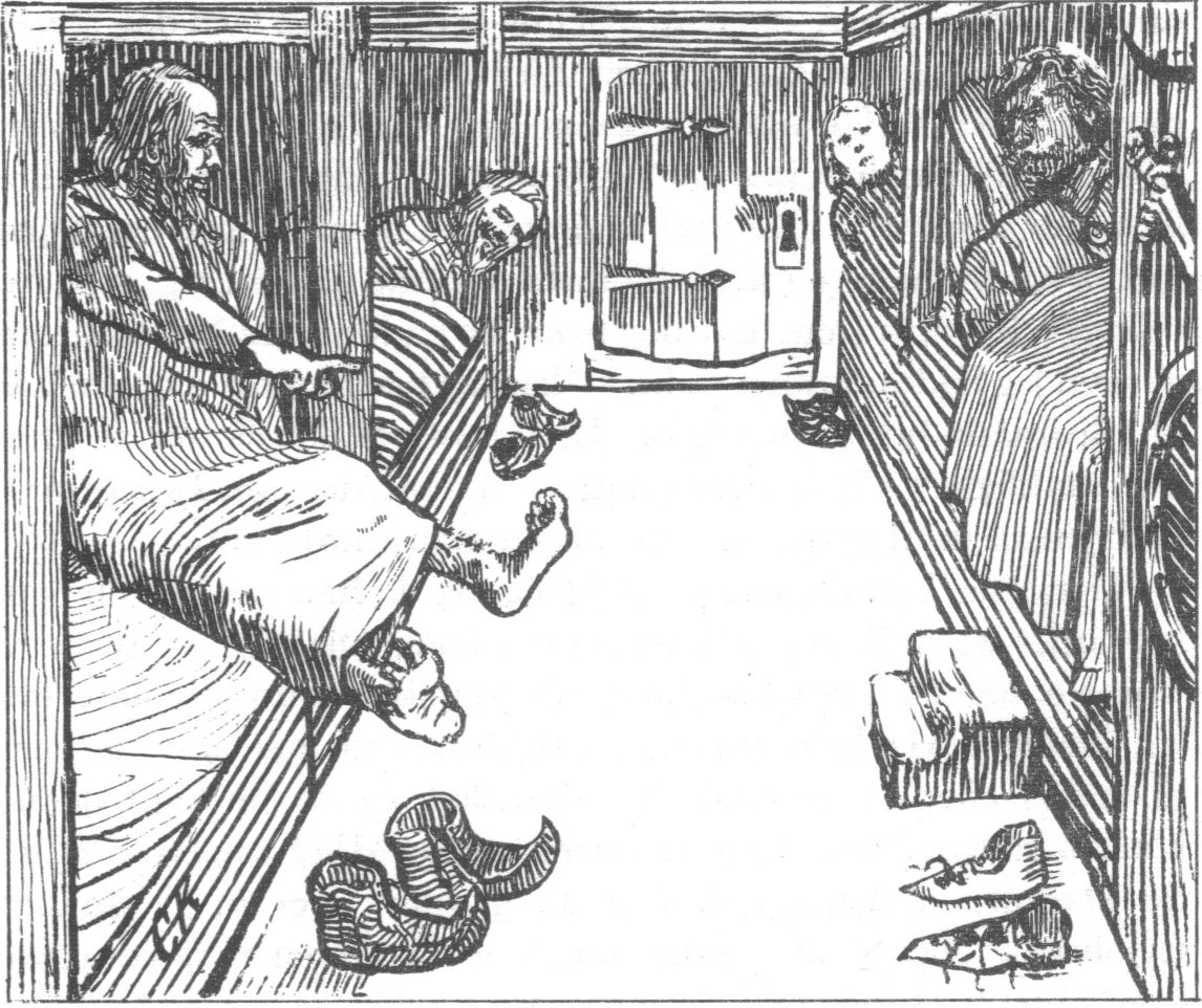 Christian Krohg: Illustration for Olav den helliges saga, Heimskringla 1899-edition. nn: «Torarin syner fram den styggaste foten sin for kongen.»